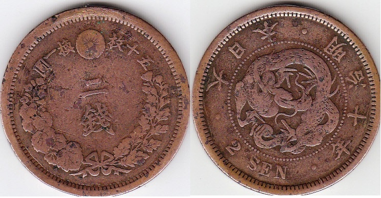 Японская монета, 2 сэна